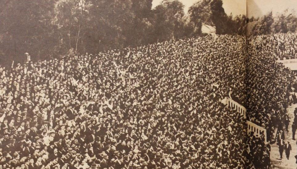 Imagen del público de Rosario Central que asistió al Parque Independencia el 18 de julio de 1939, primer clásico por torneos de Primera División de AFA.